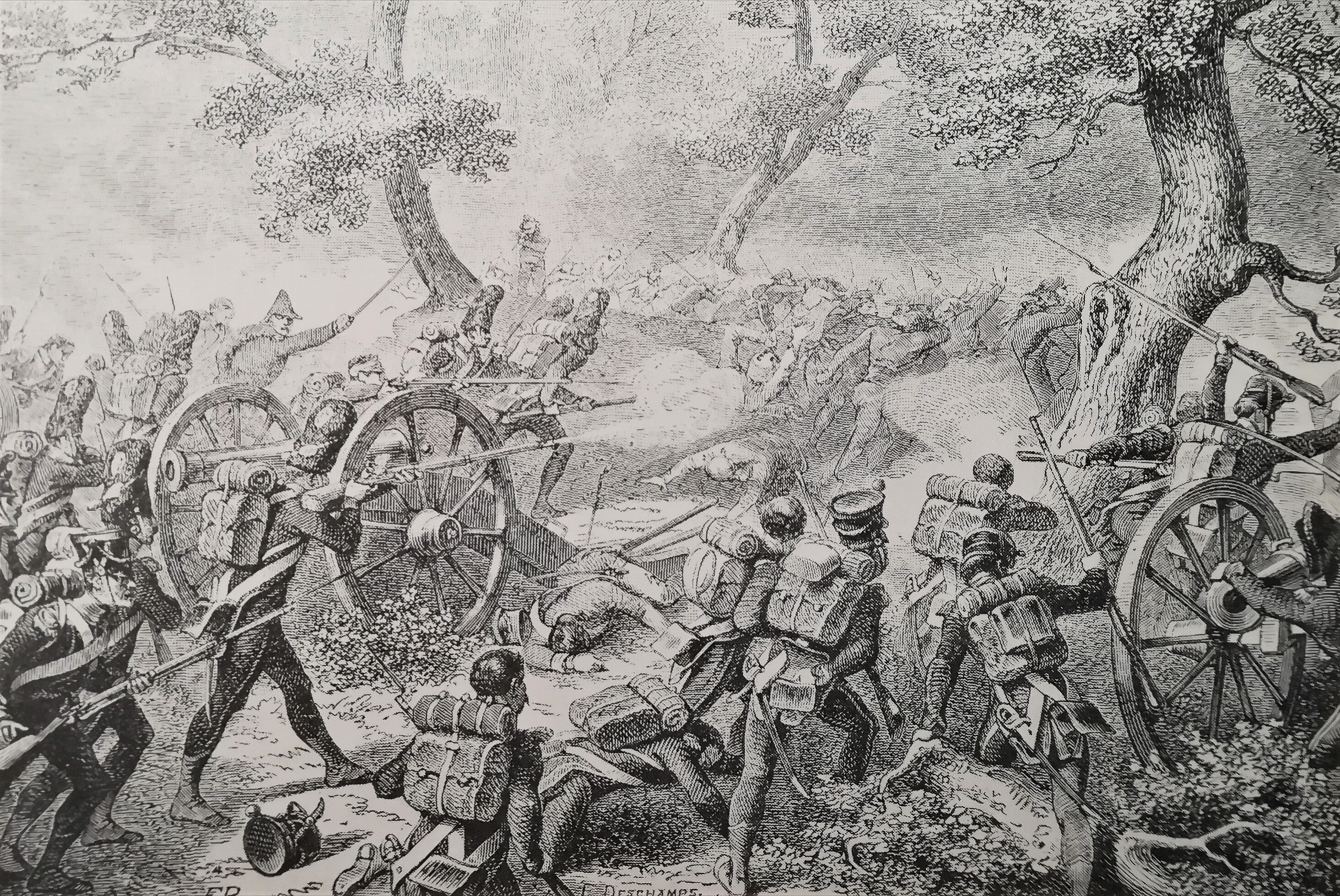 Prise de l'artillerie espagnole au combat de Gamonal, 11 novembre 1808.